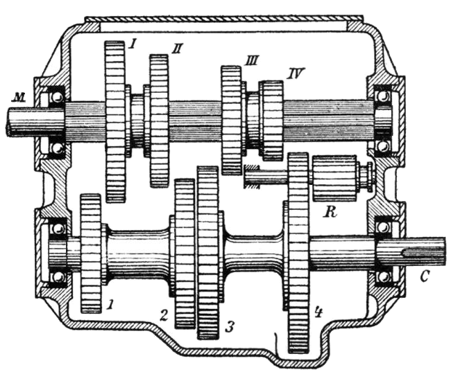 Wechselgetriebe für vier Geschwindigkeiten und Rücklauf: M Angriff der Motorwelle, C Angriff der Cardanwelle; Geschwindigkeitsräder I, II, III, IV, durch Verschiebung mit 1, 2, 3, 4 in Eingriff gebracht; Rücklaufrad R, durch Linksschiebung mit IV und 4 in Eingriff gebracht.